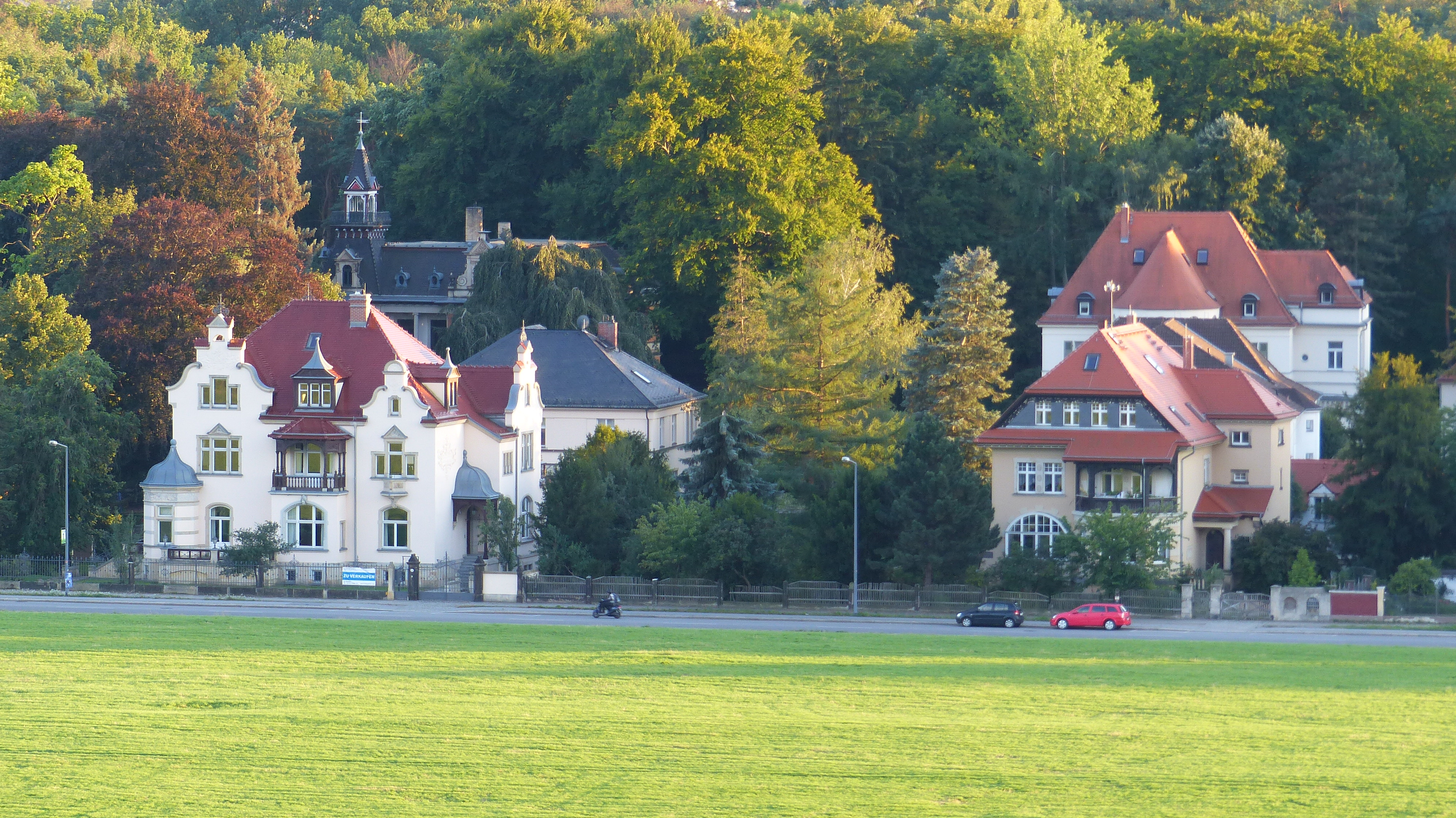 Denkmalgeschützte Villen, Käthe-Kollwitz-Ufer 90 und 91, Dresden, Sachsen